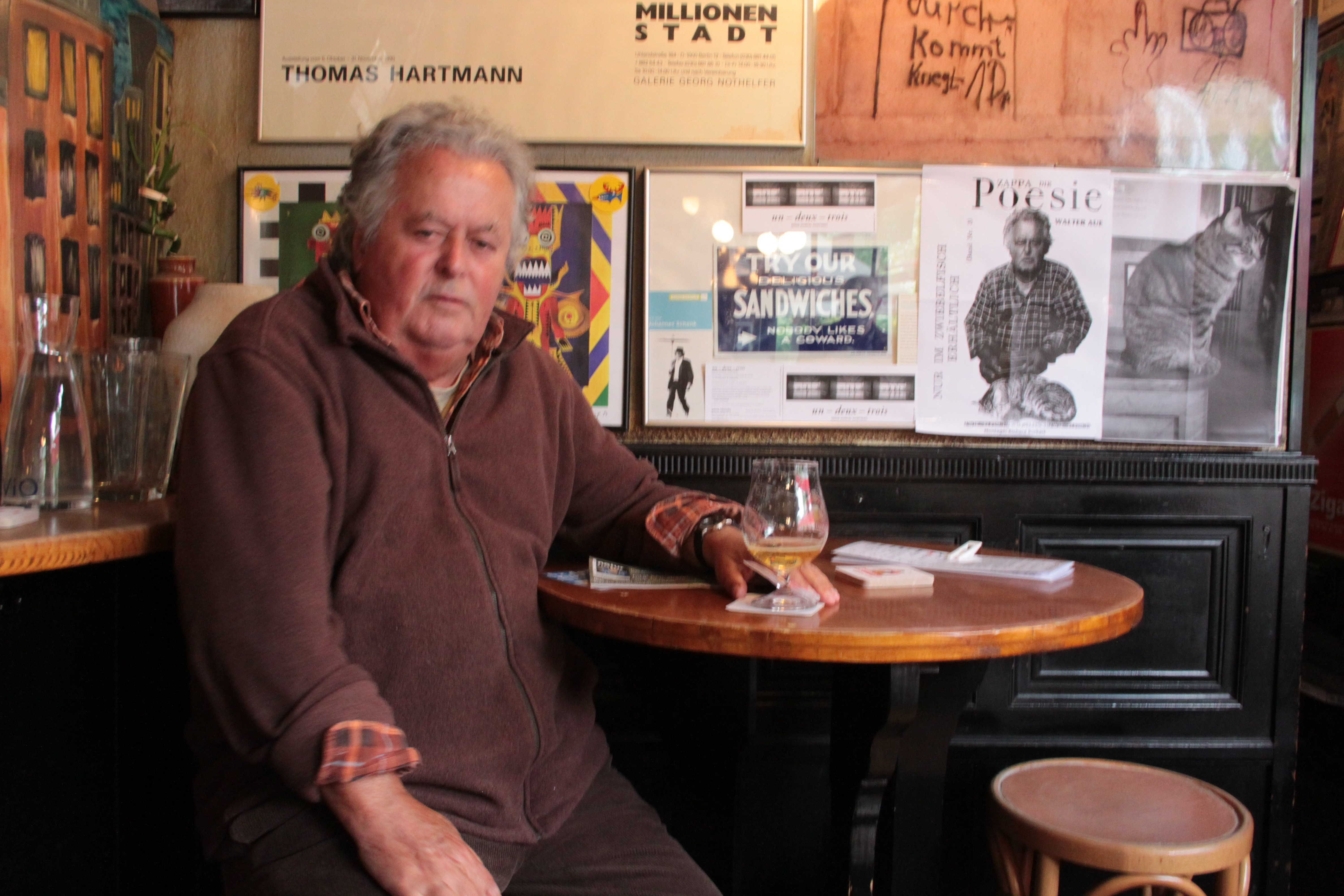 Schriftsteller